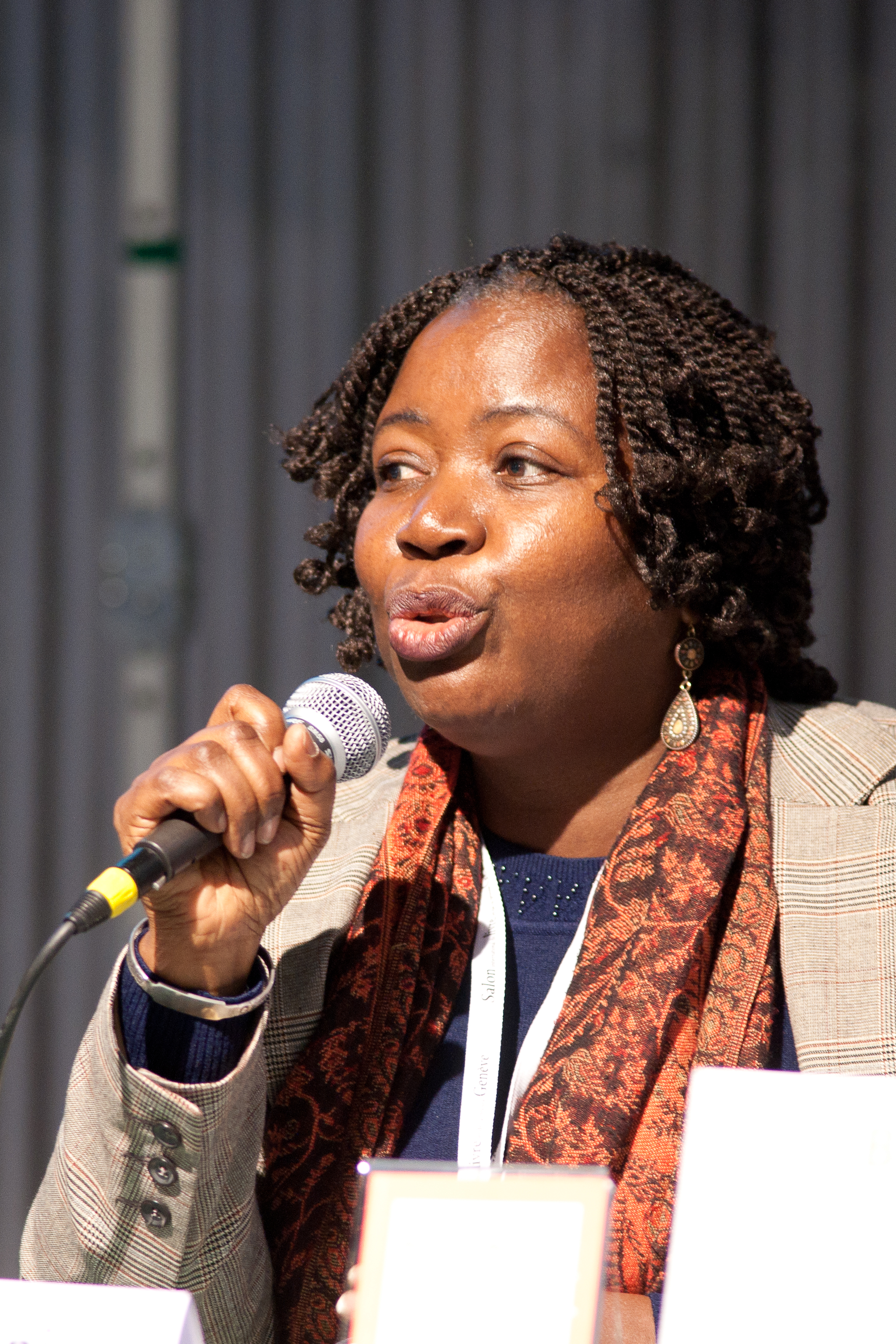 Tanella Boni - salon du livre Genève 2012